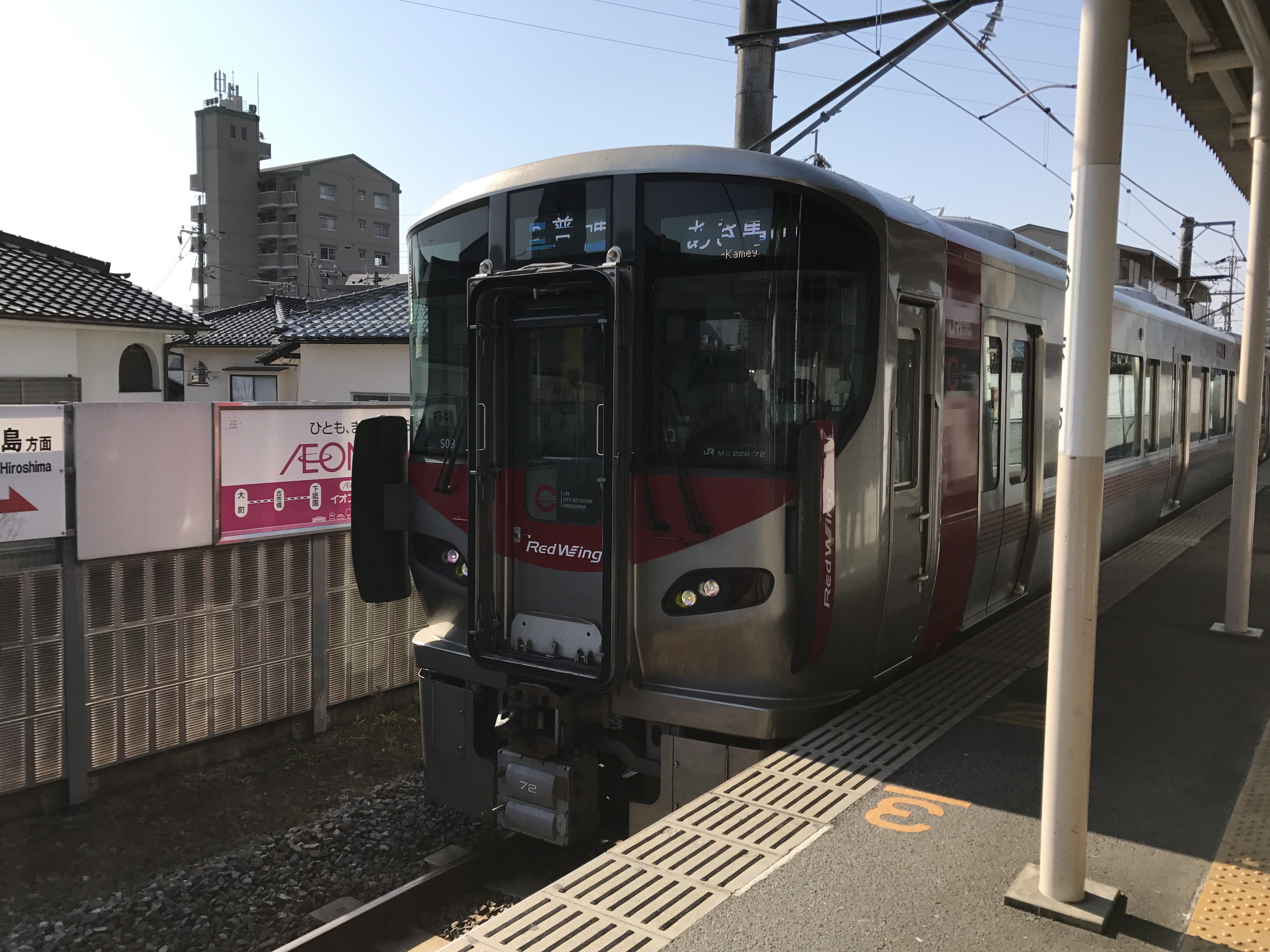 大町駅に到着するあき亀山行き可部線列車